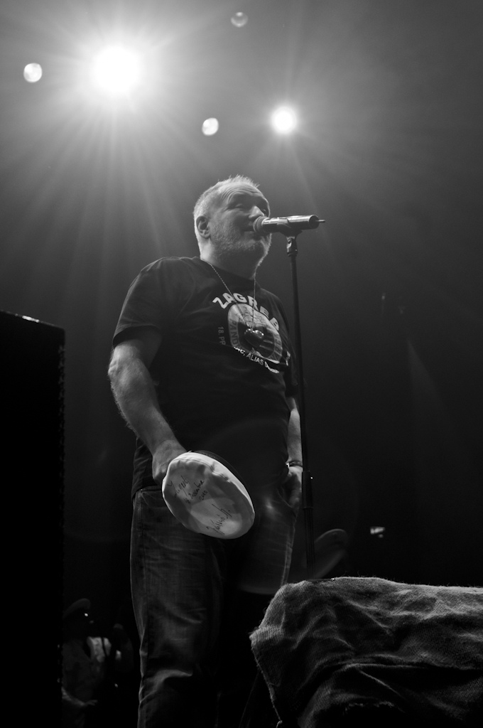 Djordje Balasevic - Zagreb 2010